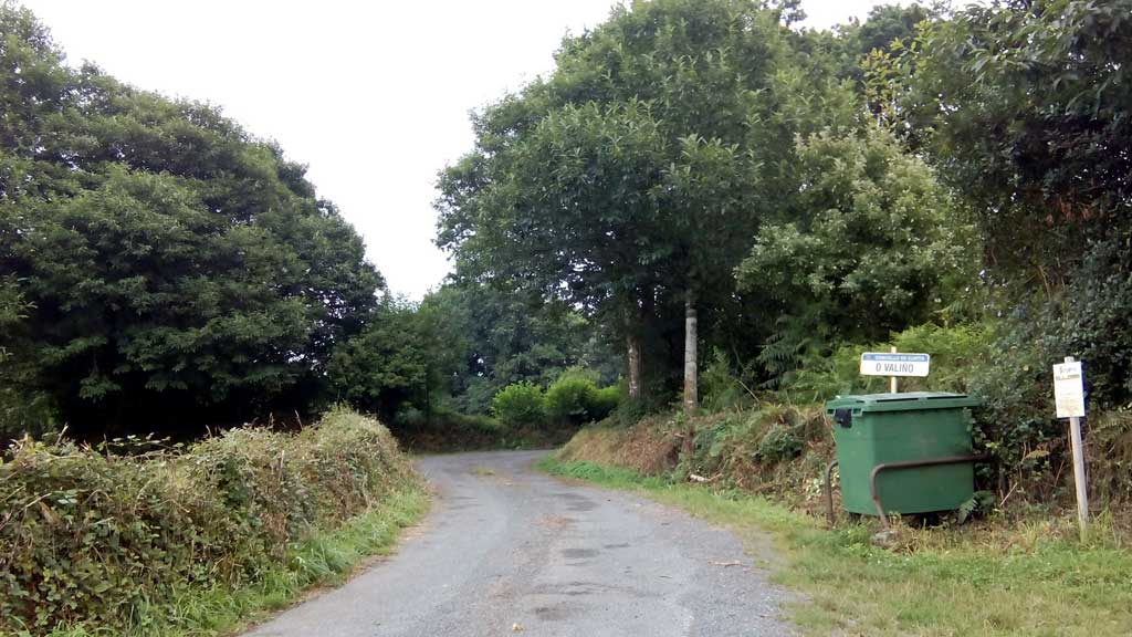 Vista do Valiño, Curtis.